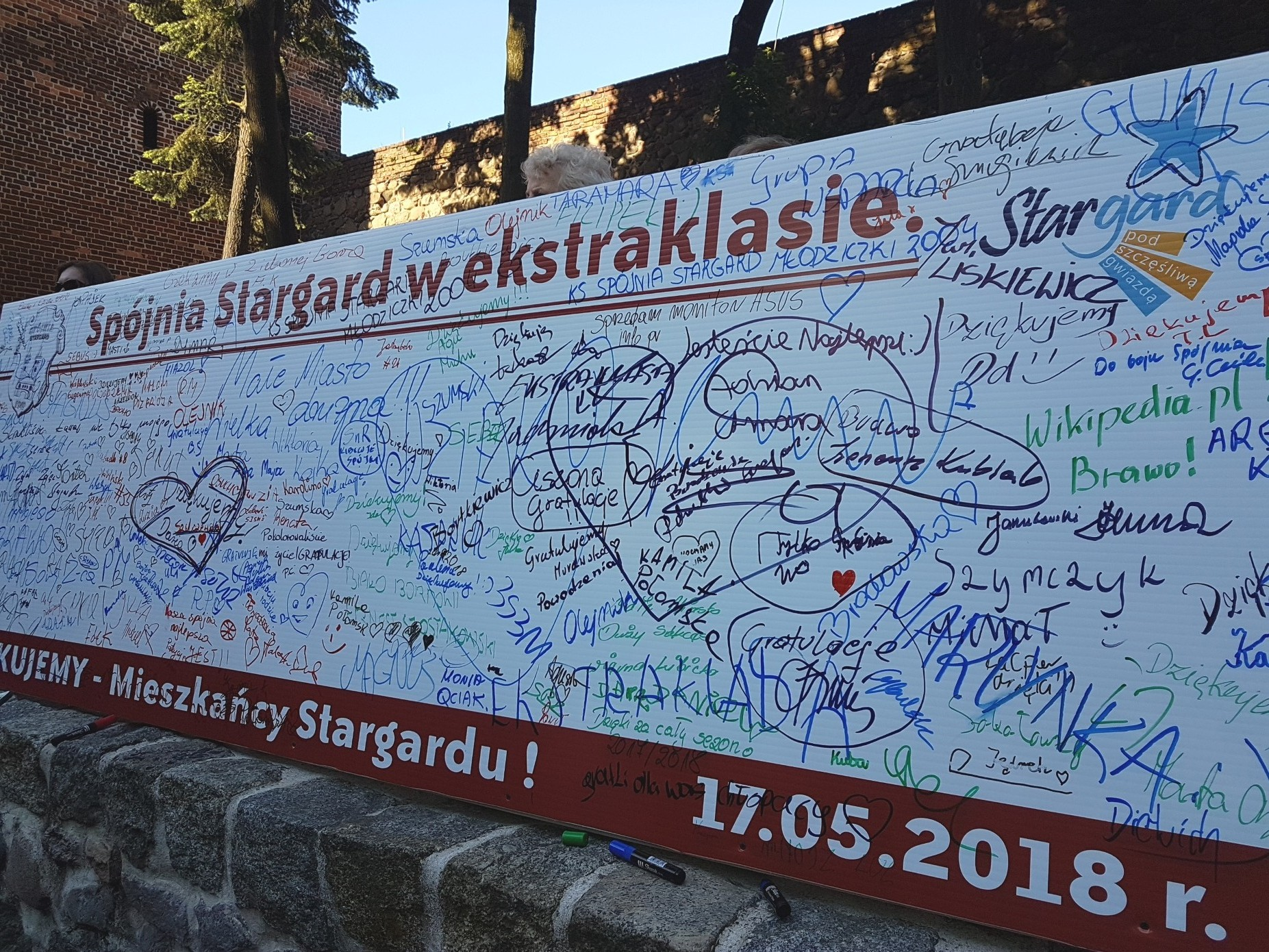 Tablica z dedykacjami dla Spójni Stargard (19.05.2018)